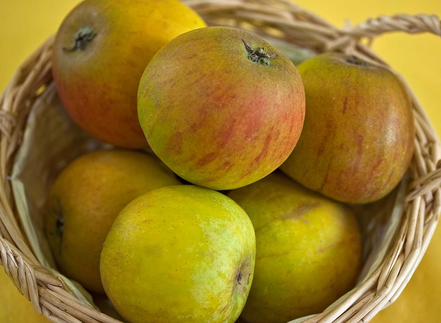 Der Holsteiner Cox ist eine Apfelsorte